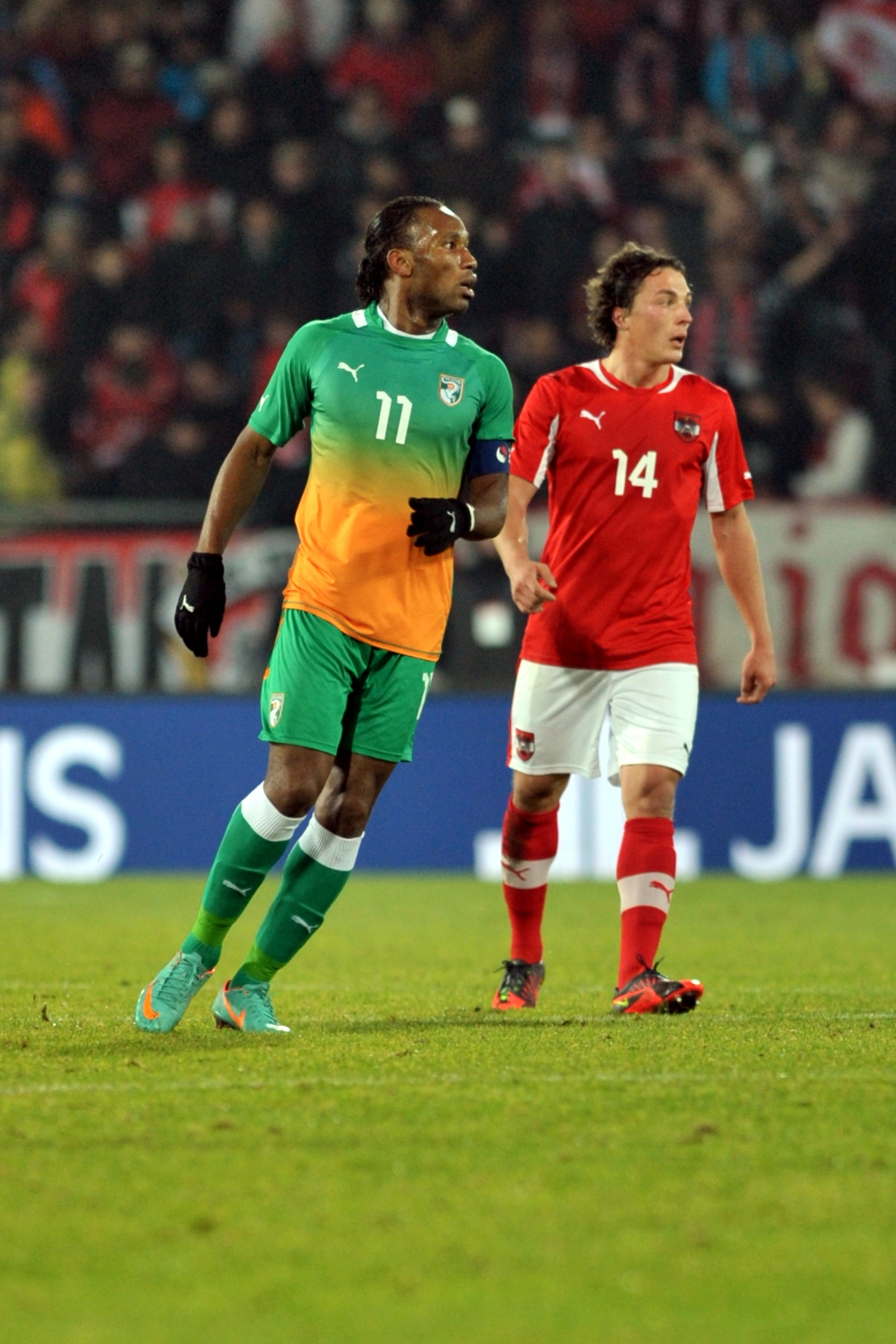 ÖFB freundschaftliches Länderspiel - Österreich vs Elfenbeinküste am 14. November 2012 The making of this work was supported by Wikimedia Austria. For other files made with the support of Wikimedia Austria, please see the category Supported by Wikimedia Österreich. Elfenbeinküste Nr. 11: Didier Drogba Österreich Nr. 14: Julian Baumgartlinger